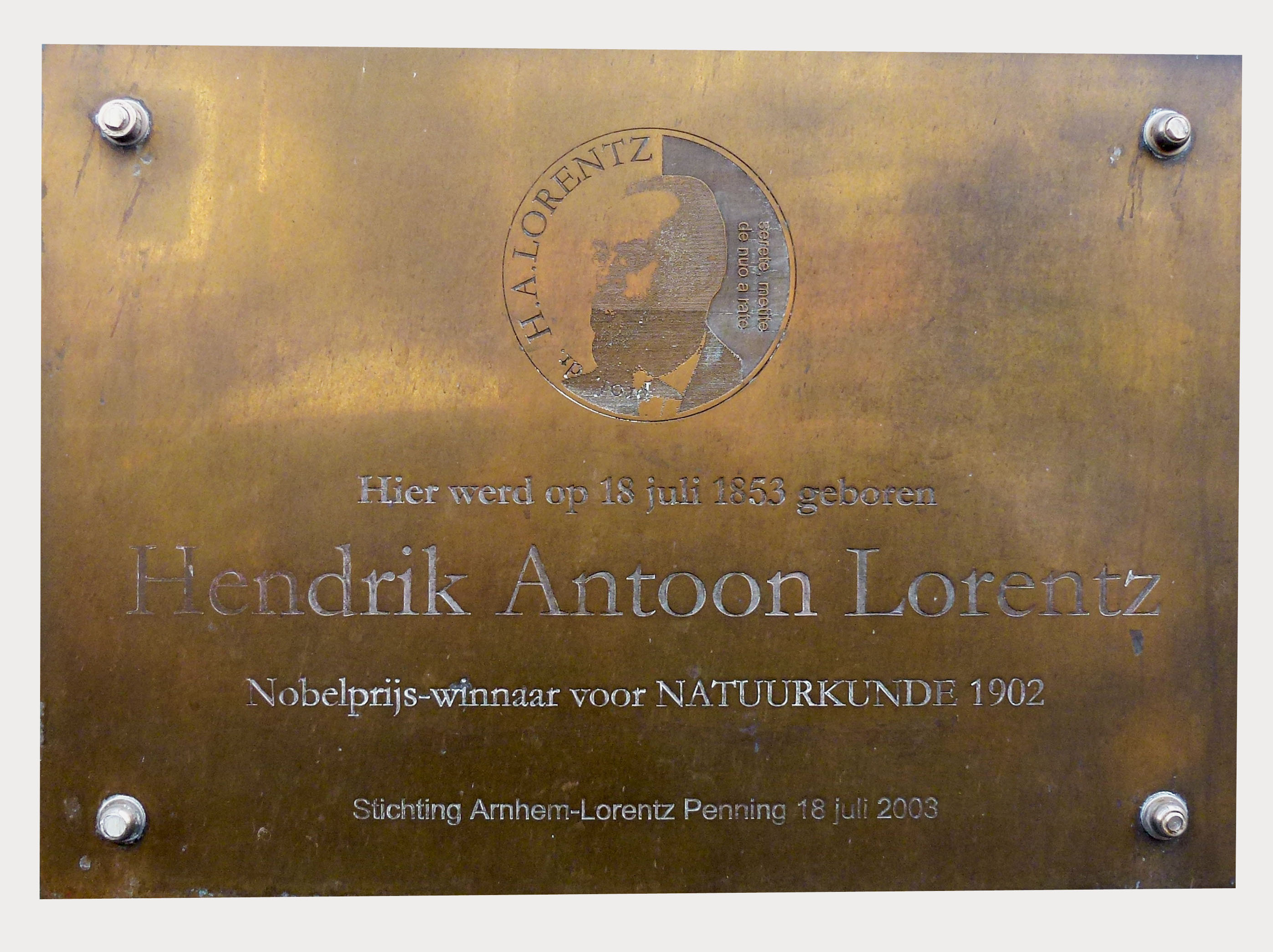 Steenstraat 48, Arnhem. Bronzen plaquette op de plek waar het geboortehuis van H. A. Lorentz heeft gestaan. De tekst: Hier werd op 18 juli 1853 geboren Hendrik Antoon Lorentz. Nobelprijs winnaar voor natuurkunde 1902. Stichting Arnhem Lorentzpenning 18 juli 2003. Bovenaan zijn afbeelding en een Latijnse tekst